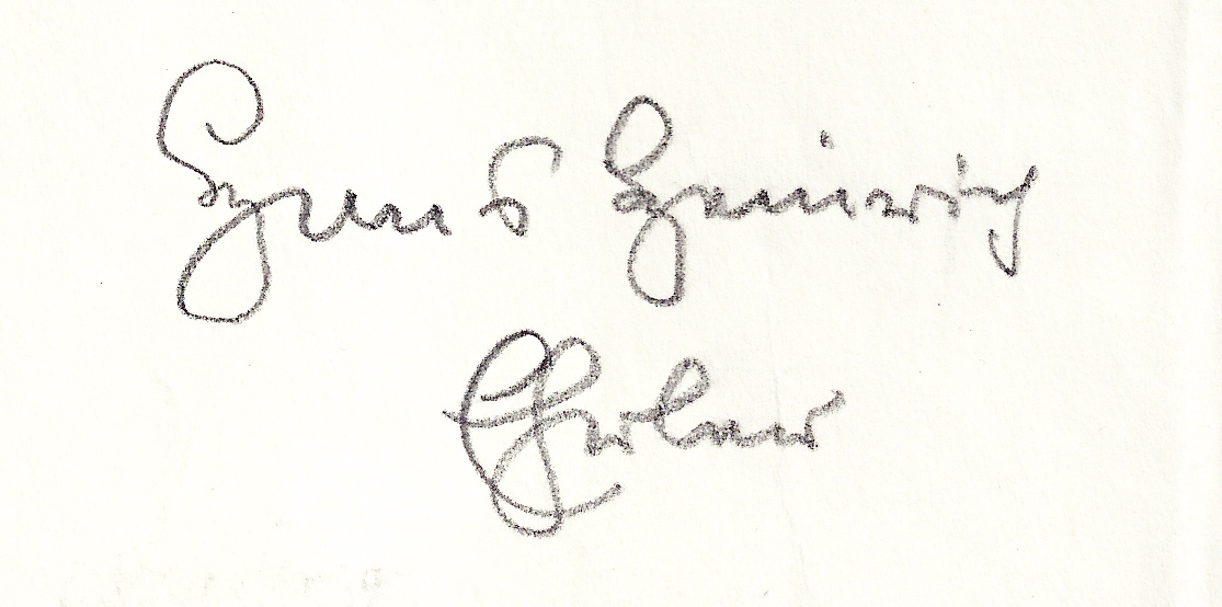 Hans Heinrich Ehrler. Signatur seines Briefes vom 10. April 1936 an meinen Vater Erich Wewel